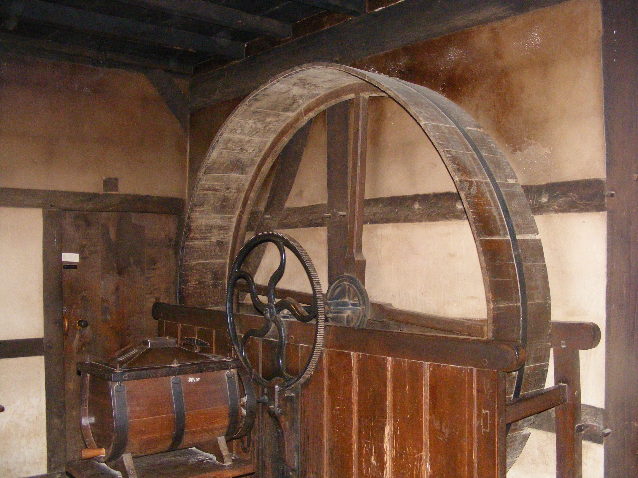 Laufrad, Tretmühle für Hunde. Hier wird ein Butterfass mittels Laufrad für einen Hund angetrieben. Der Hof (Heyerhof) steht heute im Freilichtmuseum Kommern (Eifel). In Korschenbroich (Rheinland) wurde er abgebaut und in Kommern renoviert wieder aufgebaut.